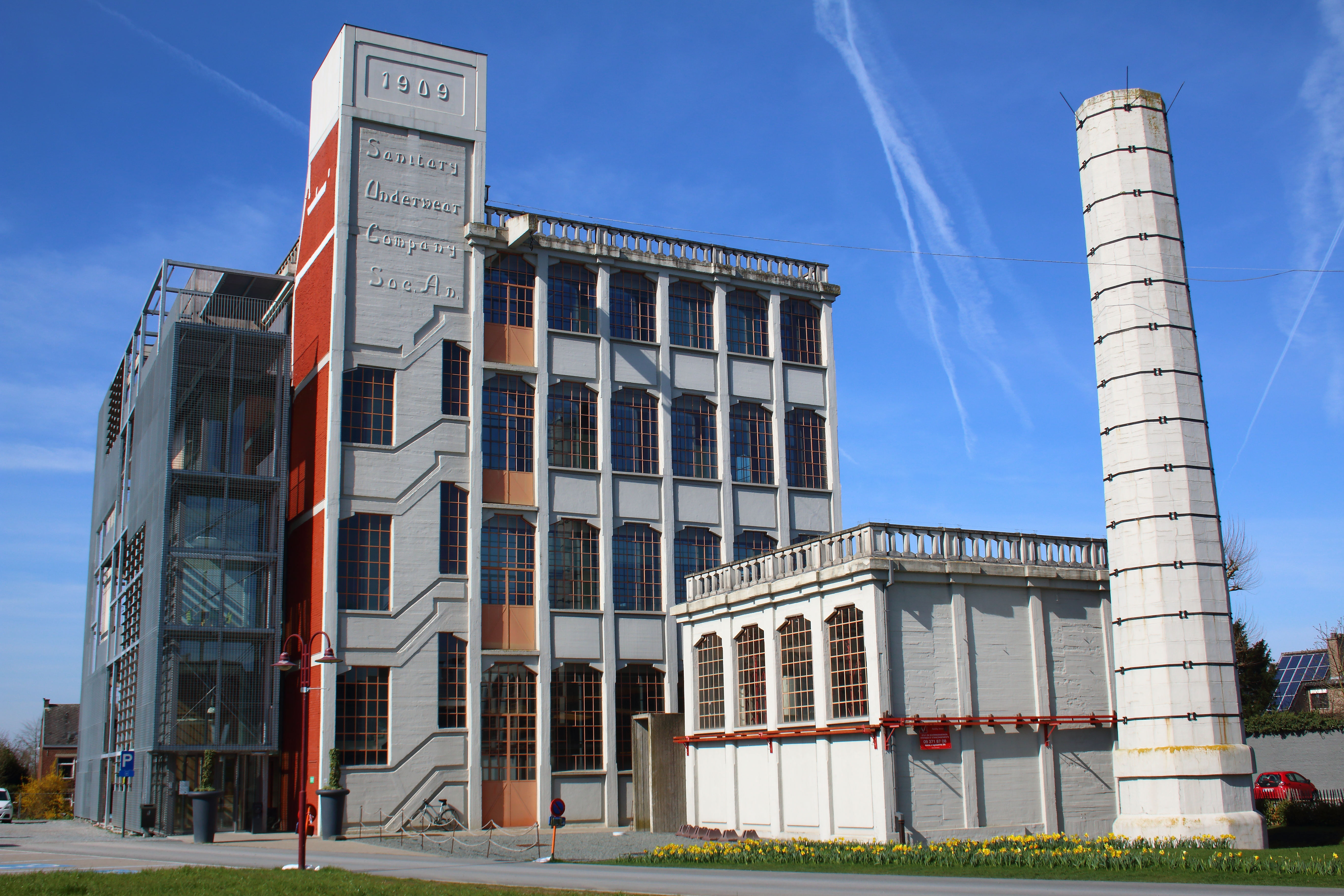 Sanitary, Zottegem